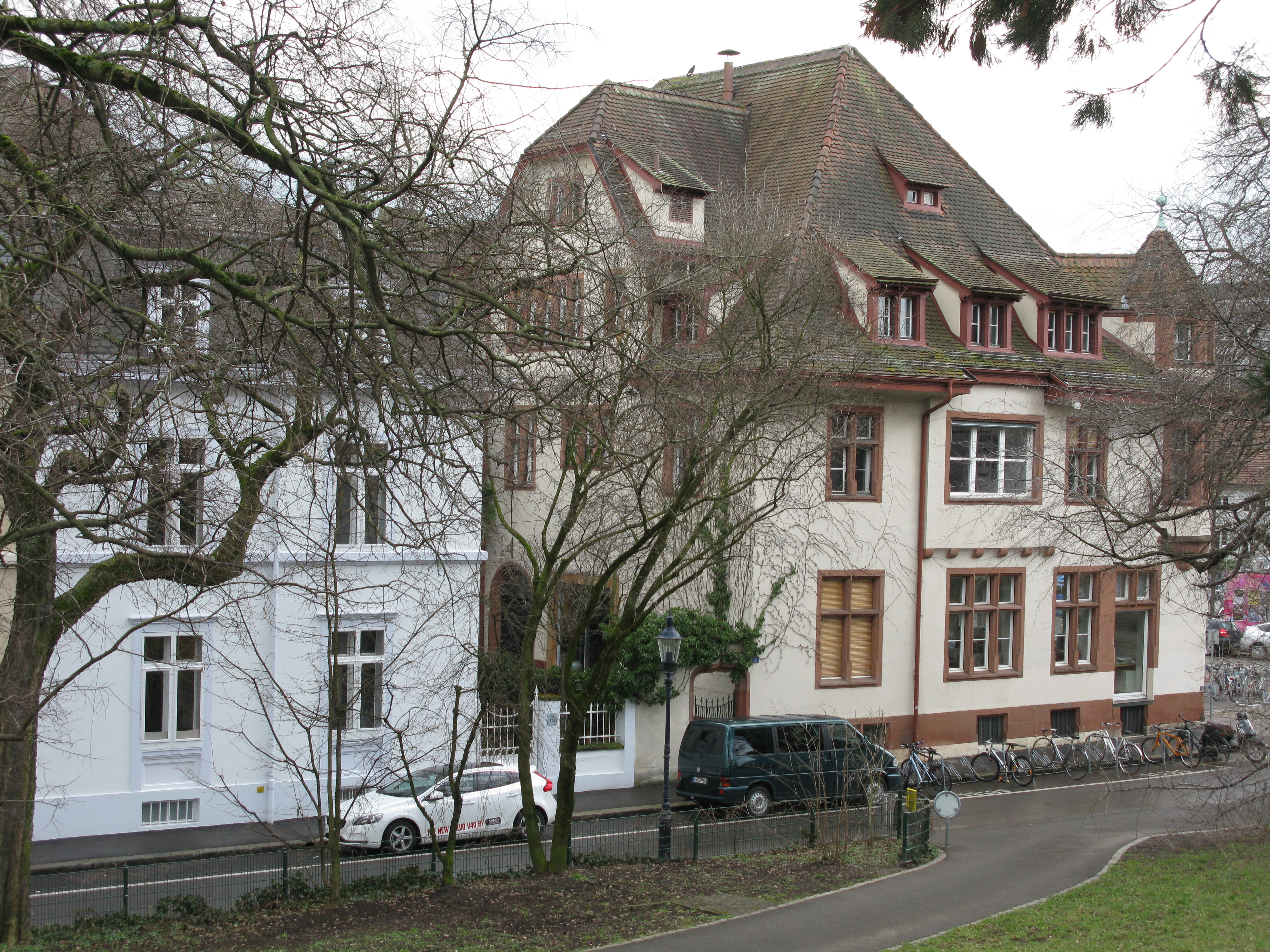 Rheinschanze 2-6, Sitz von Herzog & de Meuron